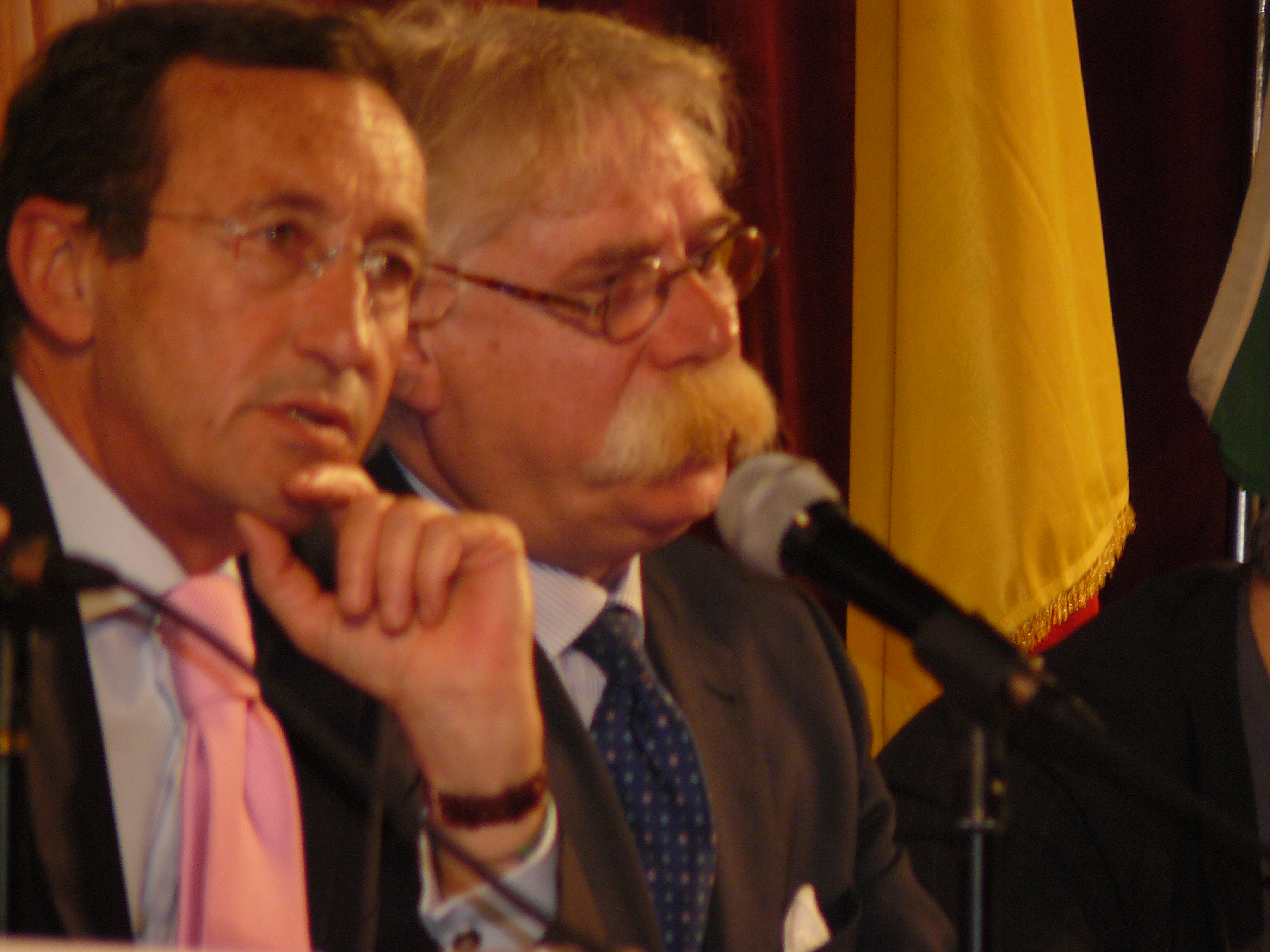 Il presidente della Camera Gianfranco Fini e il parlamentare Nicola Cristaldi nel 2009